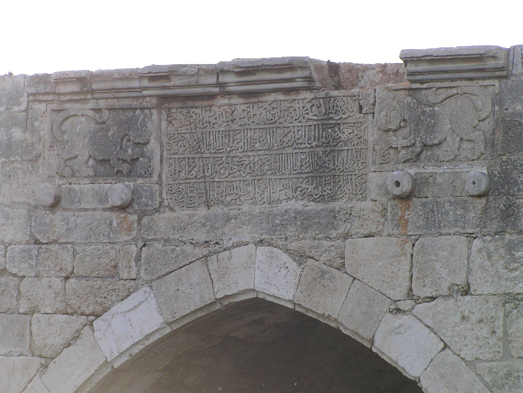 גשר ביברס ליד לוד